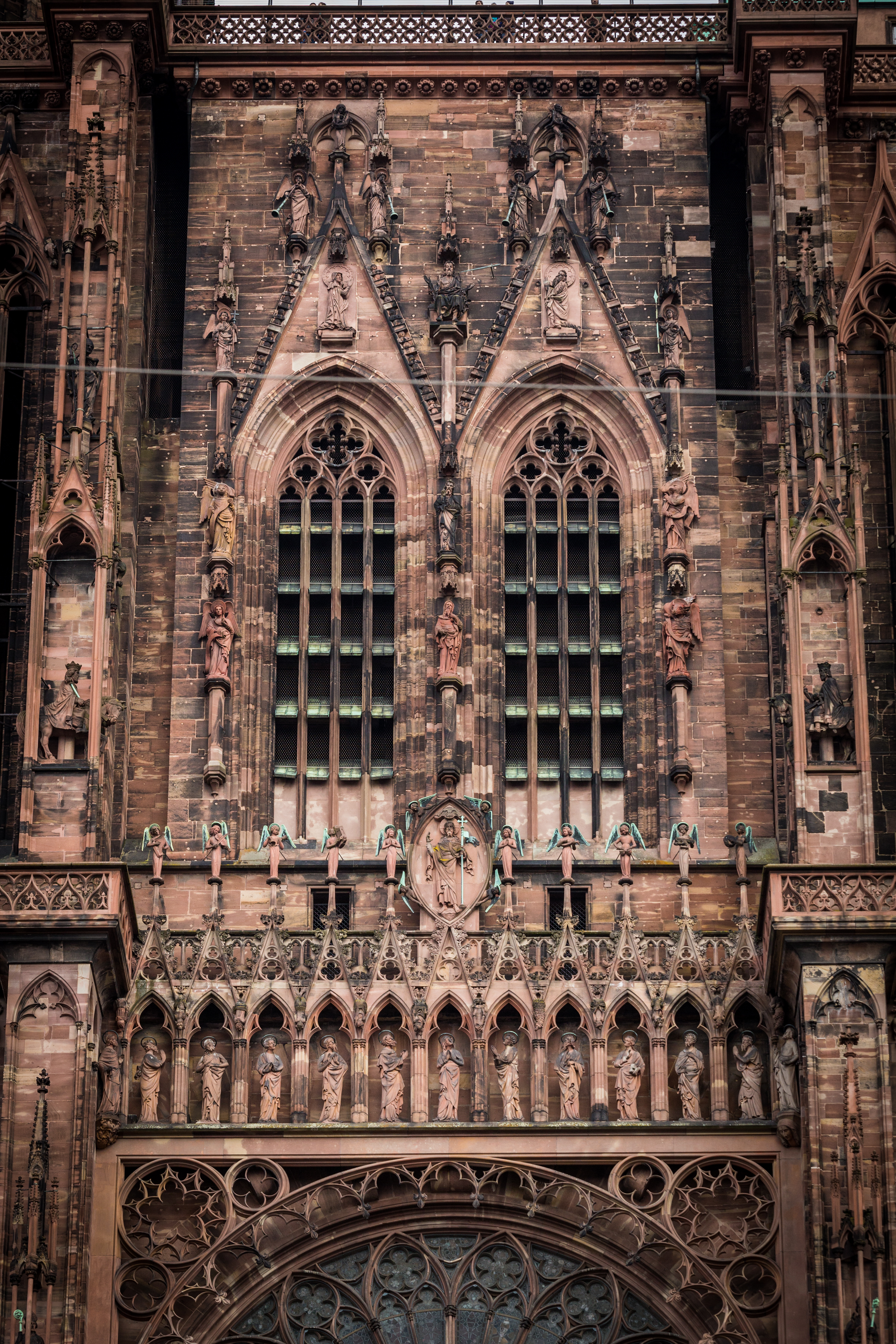 Strasbourg beffroi de la cathédrale Notre-Dame